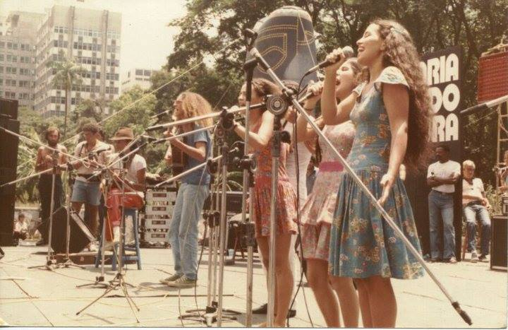 Paranga tocando na Avenida Paulista, em São Paulo.